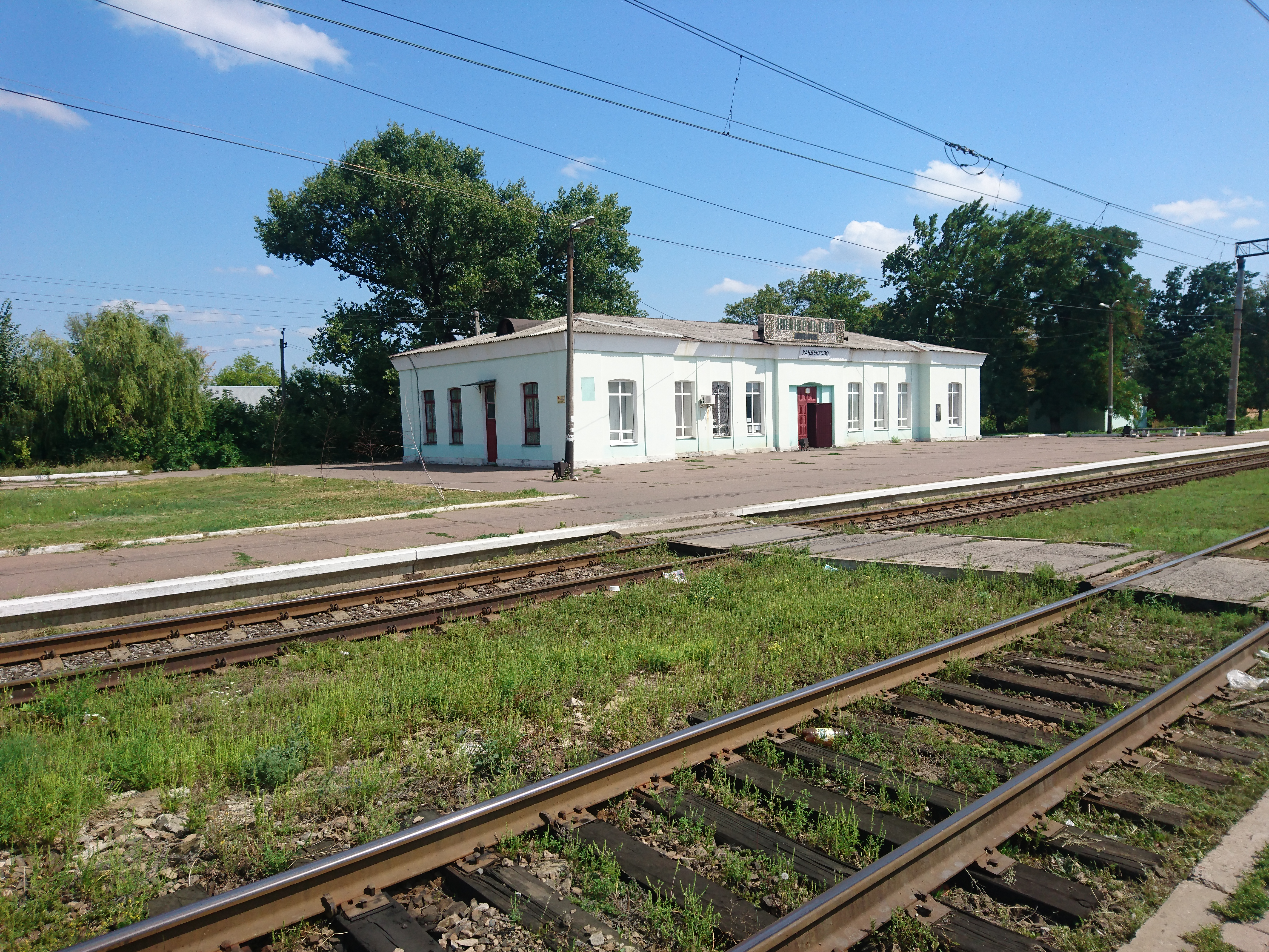 Здание станции Ханженково Донецкой Железной дороги в 2019 году